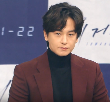 1월 22일 오후 서울시 마포구 상암동 MBC 에서 새 수목드라마 '더 게임: 0시를 향하여' 제작발표회가 열려 배우 옥택연, 이연희, 임주환, 장준호 PD가 참석해 작품에 대한 소개와 배역을 설명하고 있다.